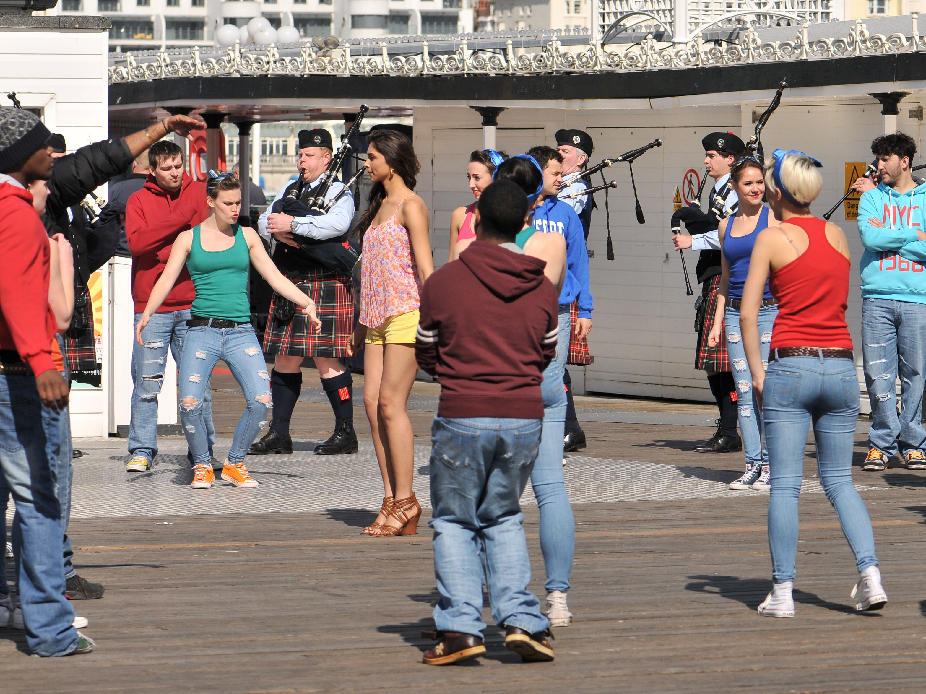 Deepika Padukone at a film set in Brighton.